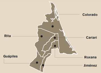 Mapa de los distritos del cantón de Pococí, provincia de Limón, Costa Rica.